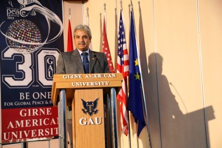 نویسنده، مترجم، محقق، تحلیل گر سیاسی، آکادمیسین